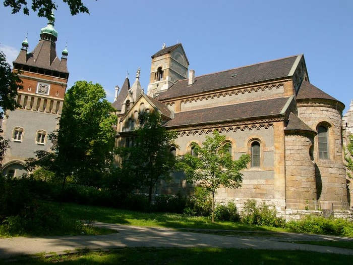 (Church of Ják) Jáki templom, Vajdahunyad Vára Városliget, Budapest, Hungary